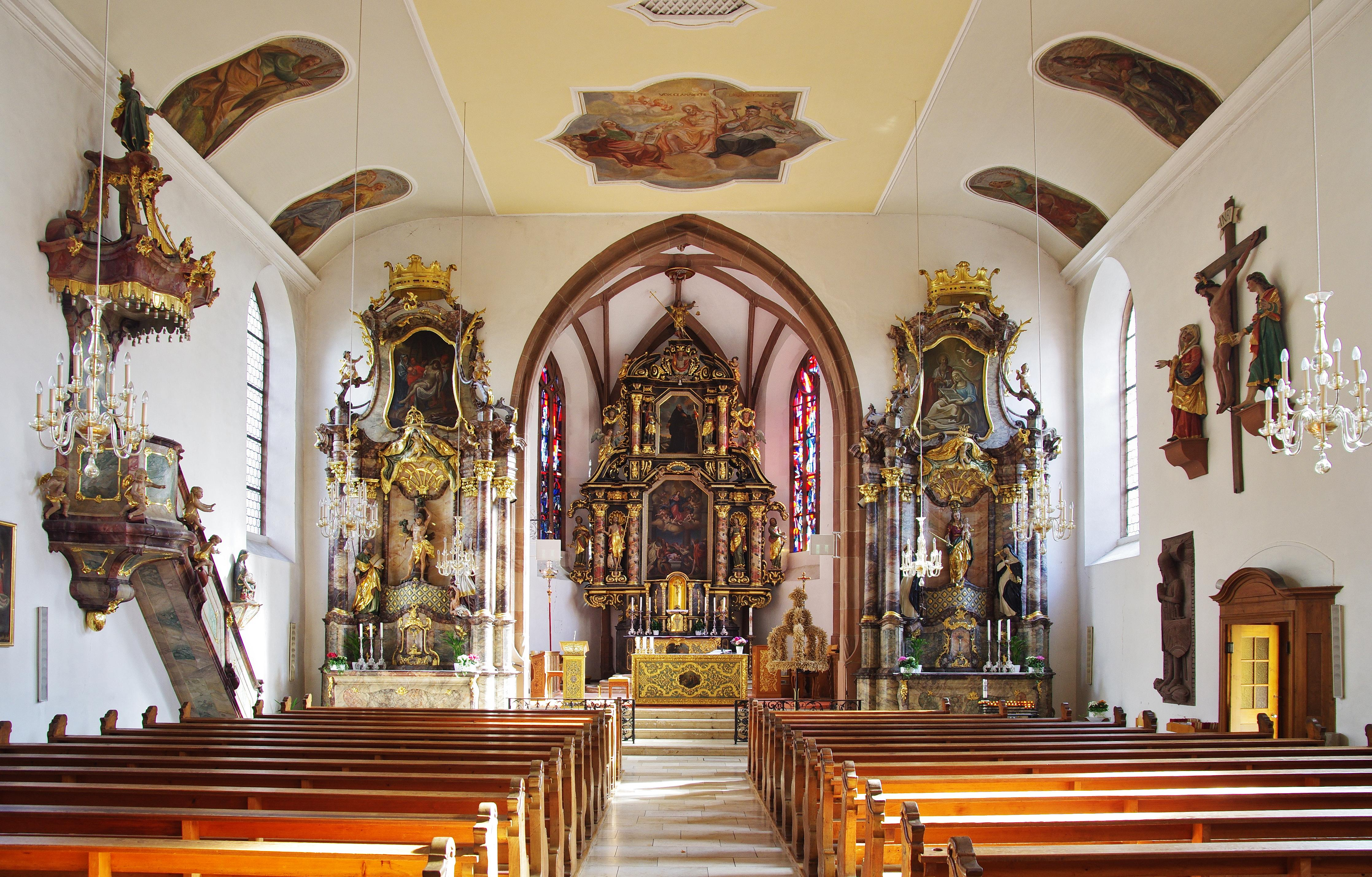 Blick in den Innenraum der Kirche in Richtung Hauptaltar.